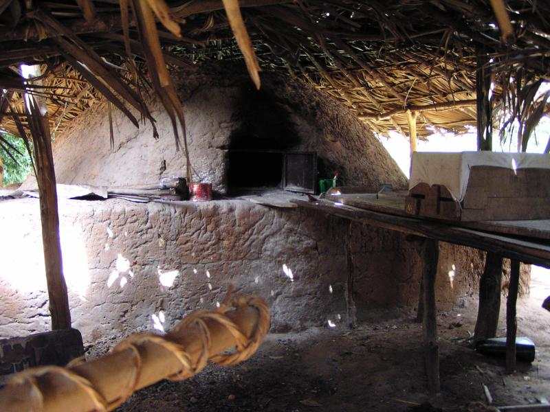 (tapalapa) bread oven at sonko kunda